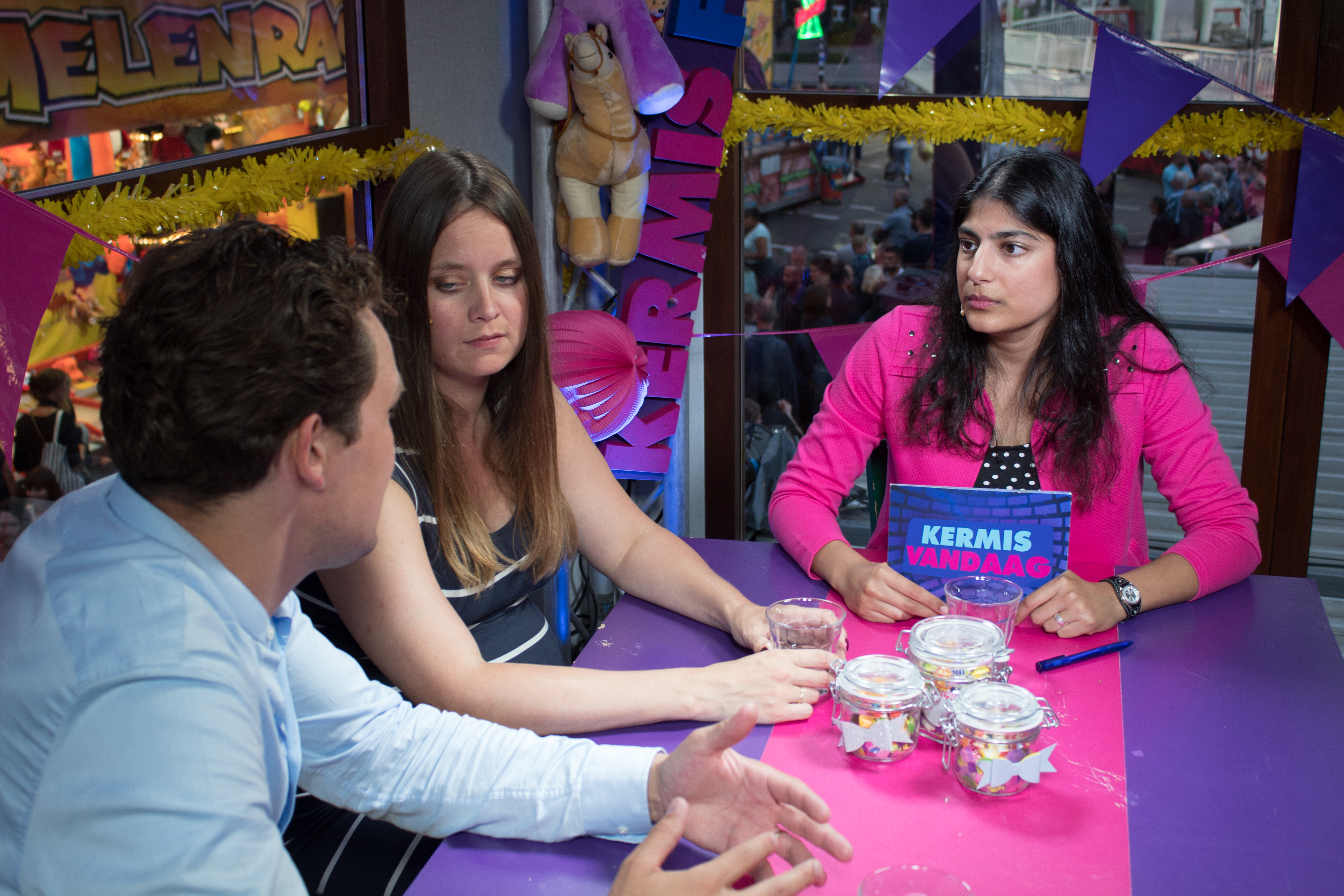 Programma Kermis Vandaag van Kermis FM